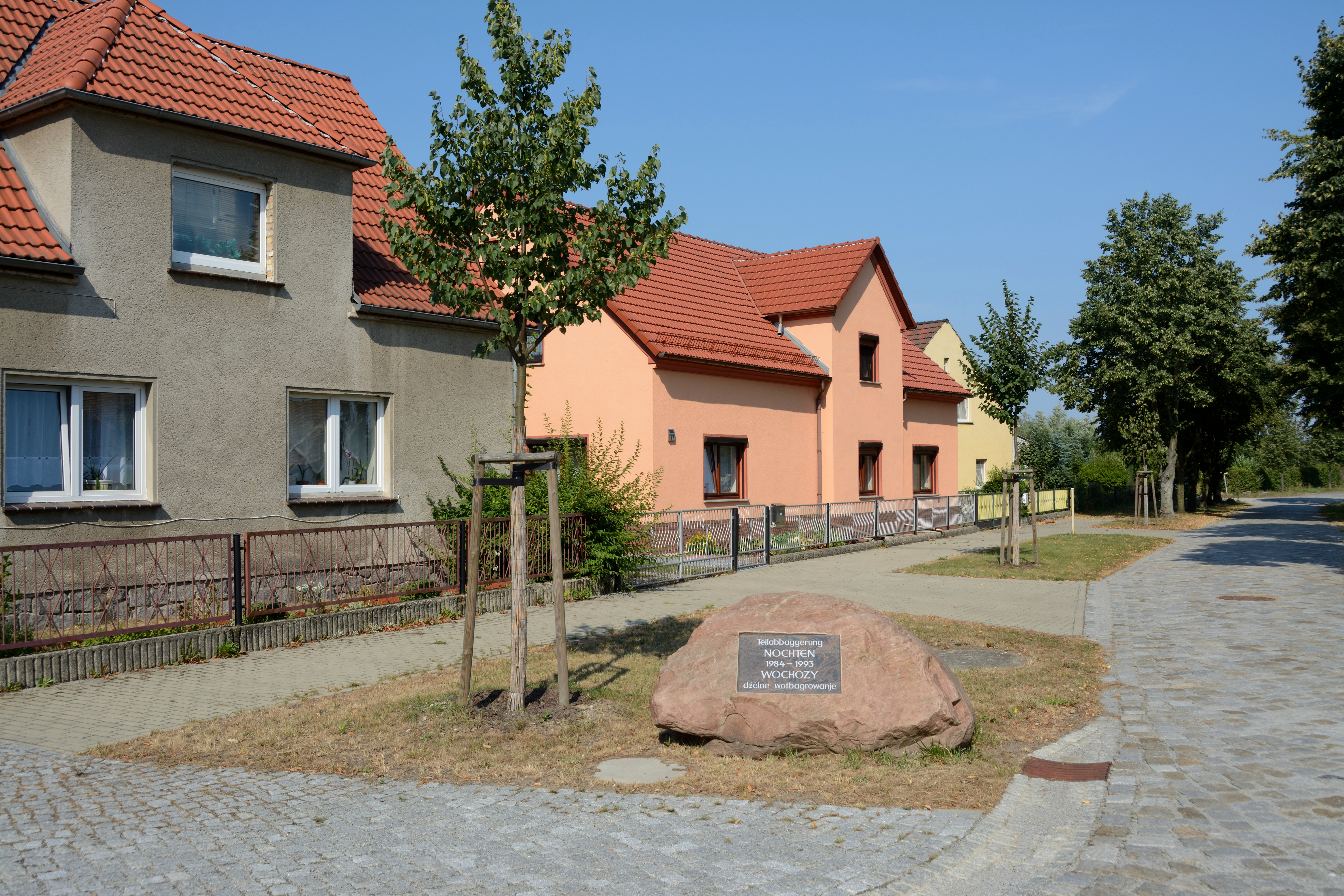 Ein Gedenkstein in Nochten zur Erinnerung an die Teilzerstörung des Ortes.